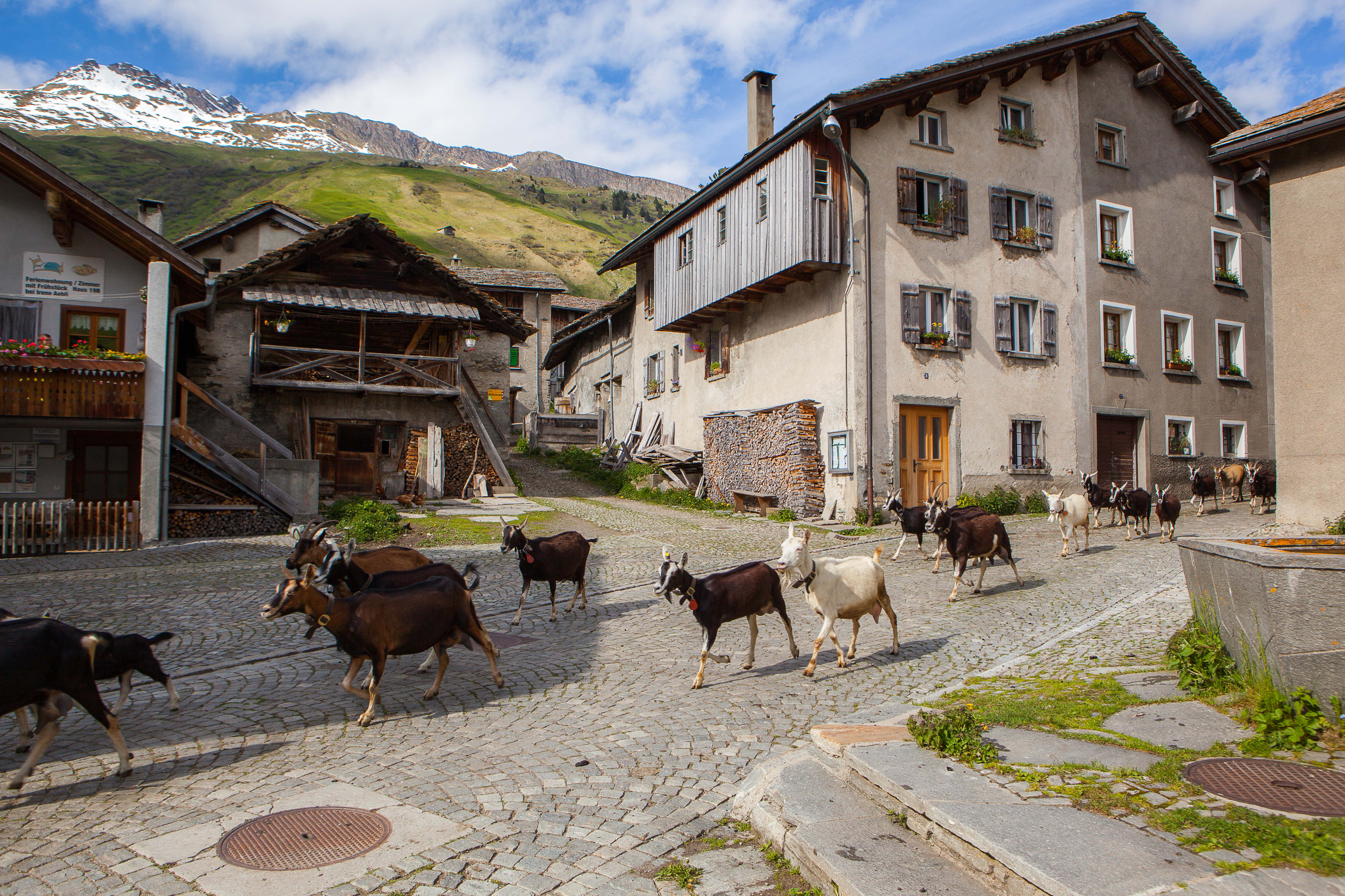 Tägliches Eintreffen der Ziegen (Sommer)